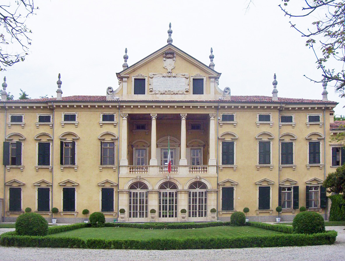 Facciata di Villa Maffei, a Valeggio su Mincio